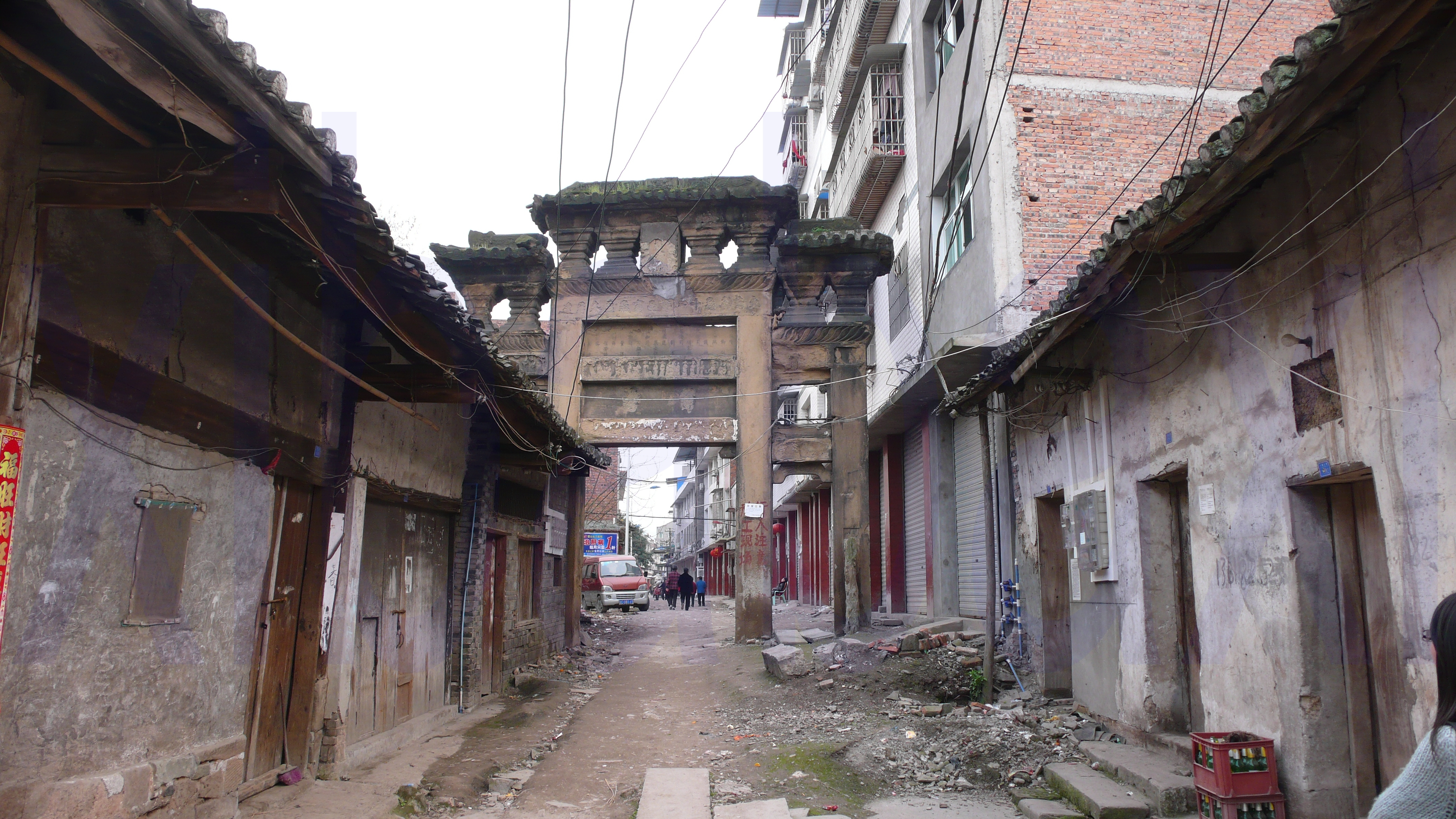 中文（台灣）: 璧山縣八塘牌坊西北面